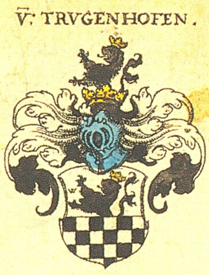 Wappen der Bayerischen Adelsfamilie Trugenhofen